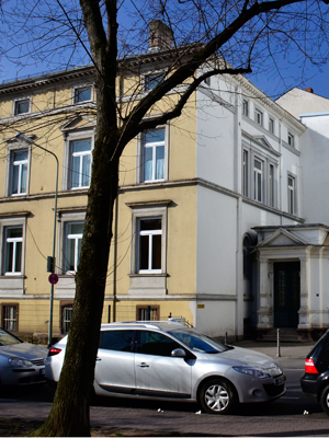 Haus Arnsburgerstraße 1